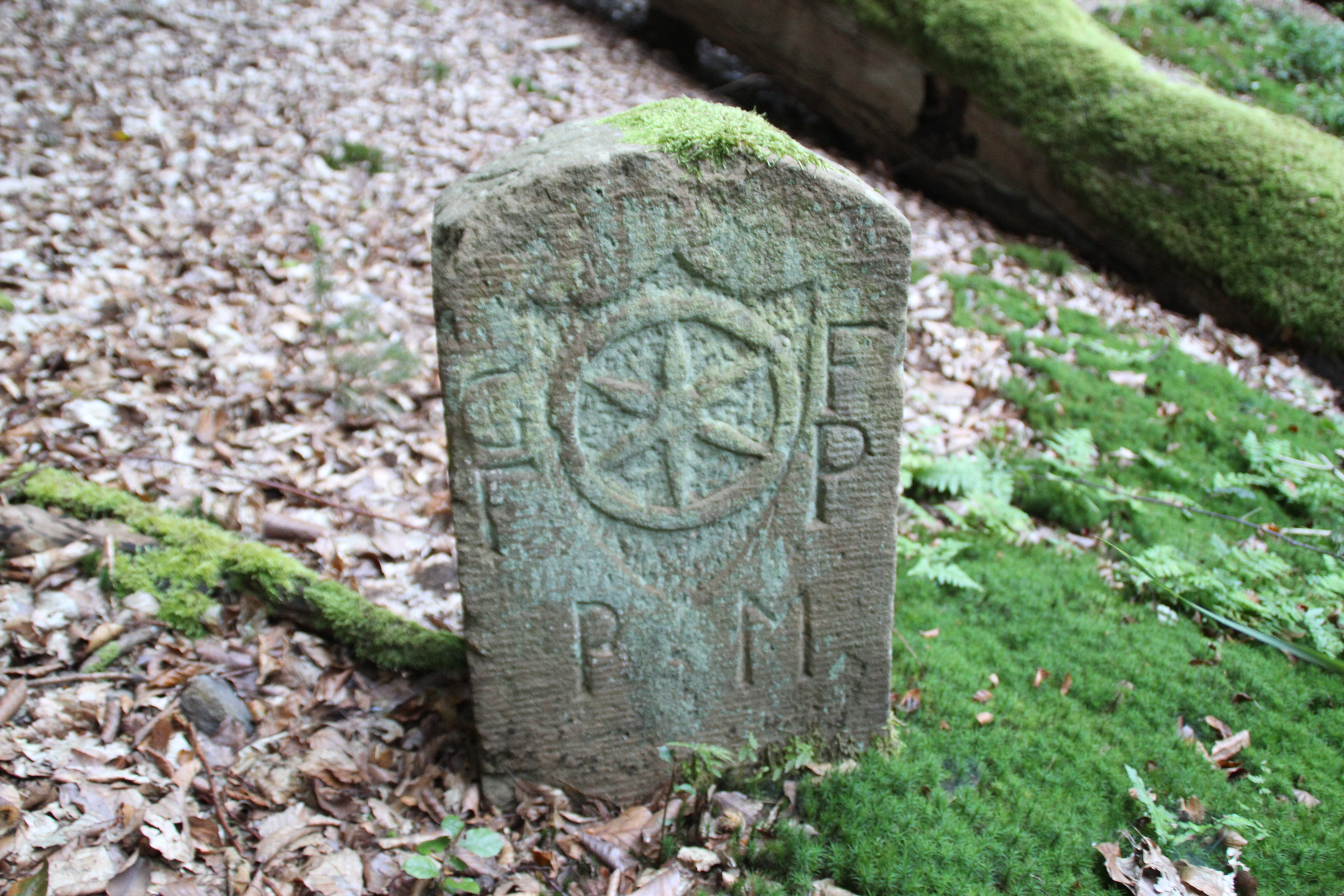 Grenzstein 182 an der Daunert zwischen Hemsbach und Brücken